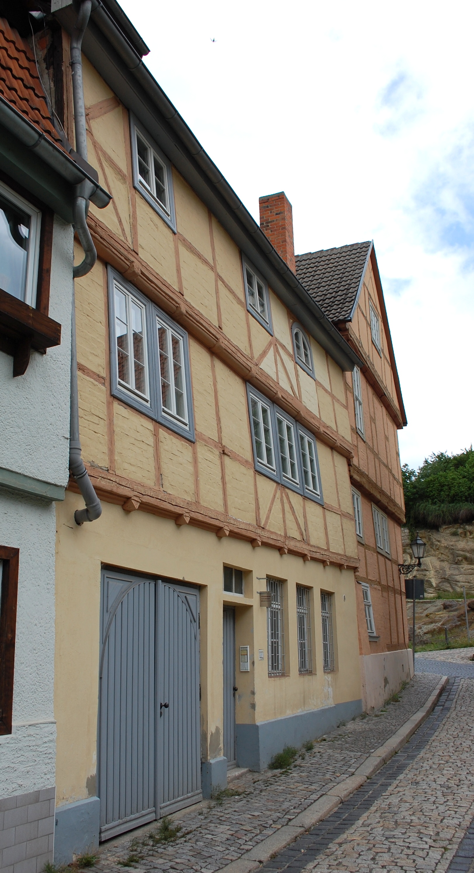 Haus Mühlenstraße 21 in Quedlinburg, Seitenhaus zur Rittergasse